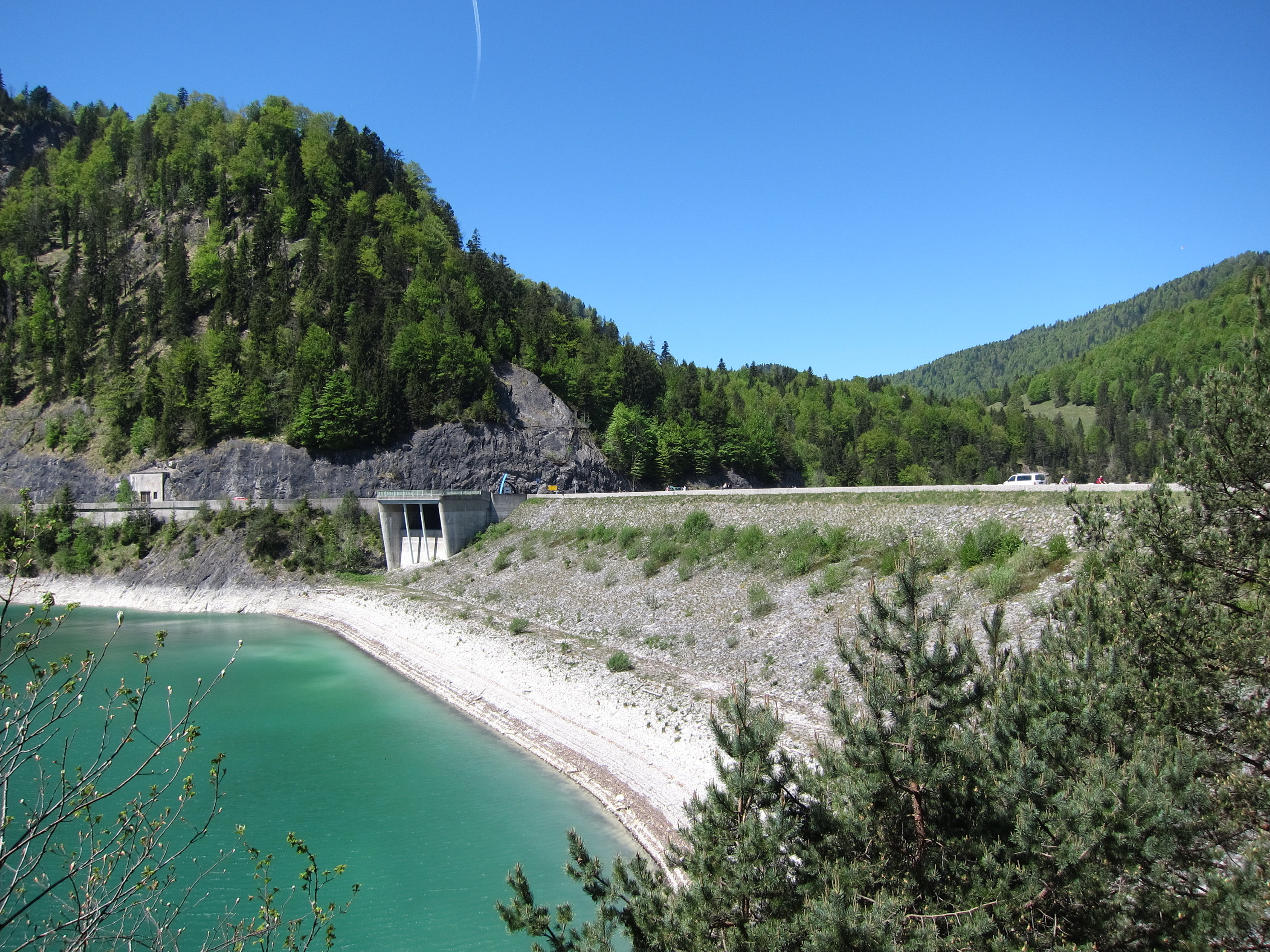 Sylvensteindamm, Wasserseite, alte Hochwasserentlastung